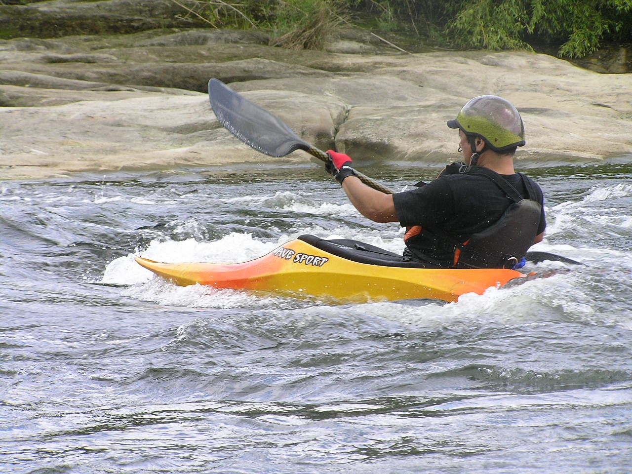 ポリエチレン製カヤック（加古川）檀上晴一